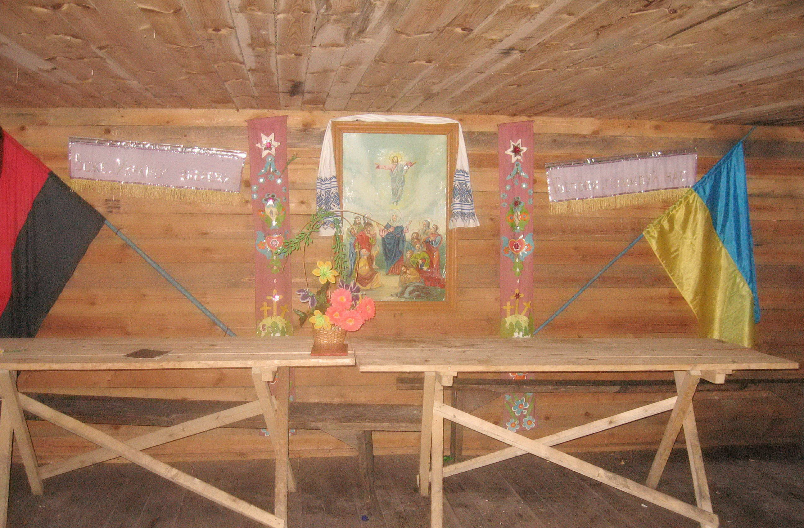 Музей всередині.